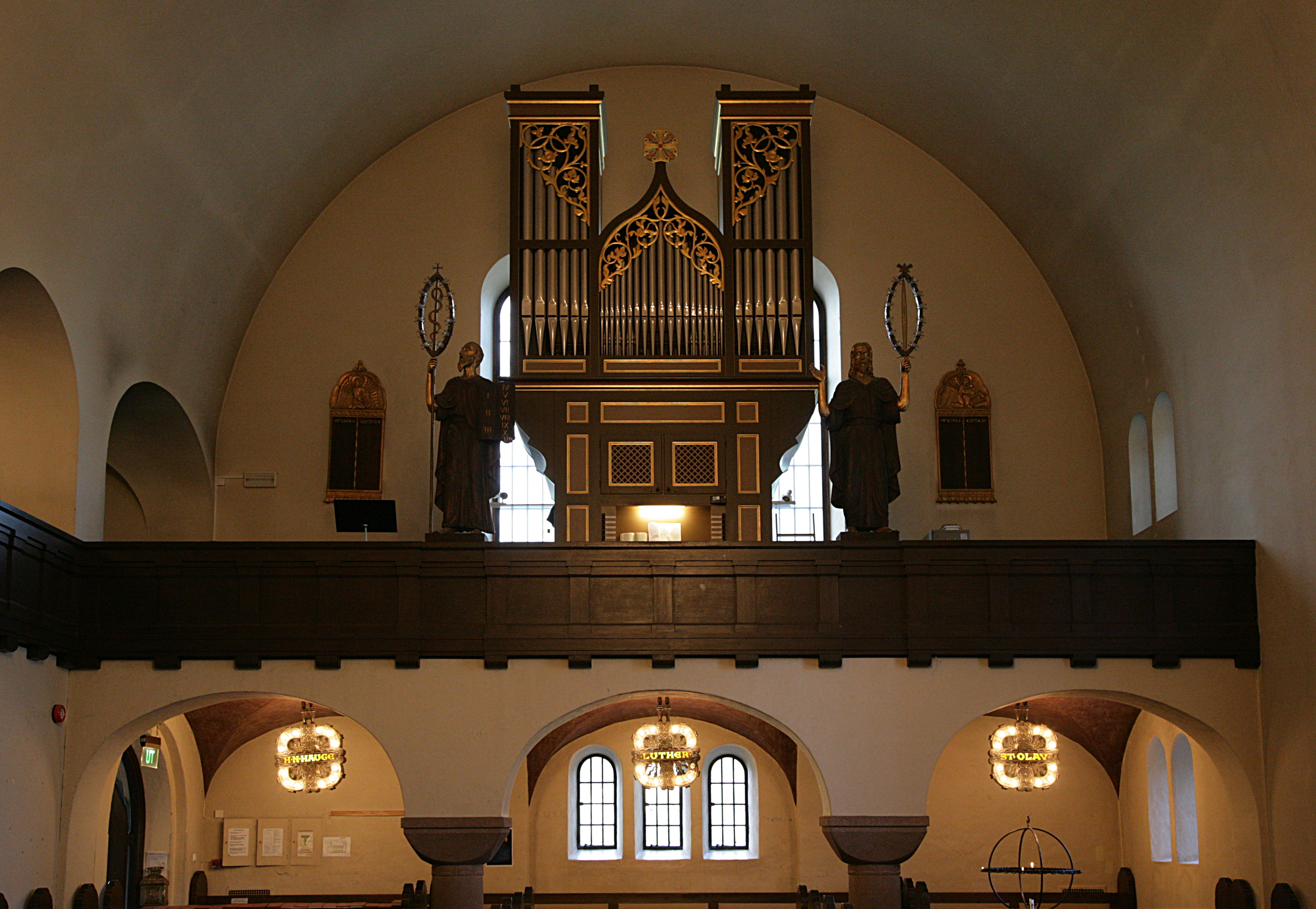 Bekkelaget kirke, a church in Oslo